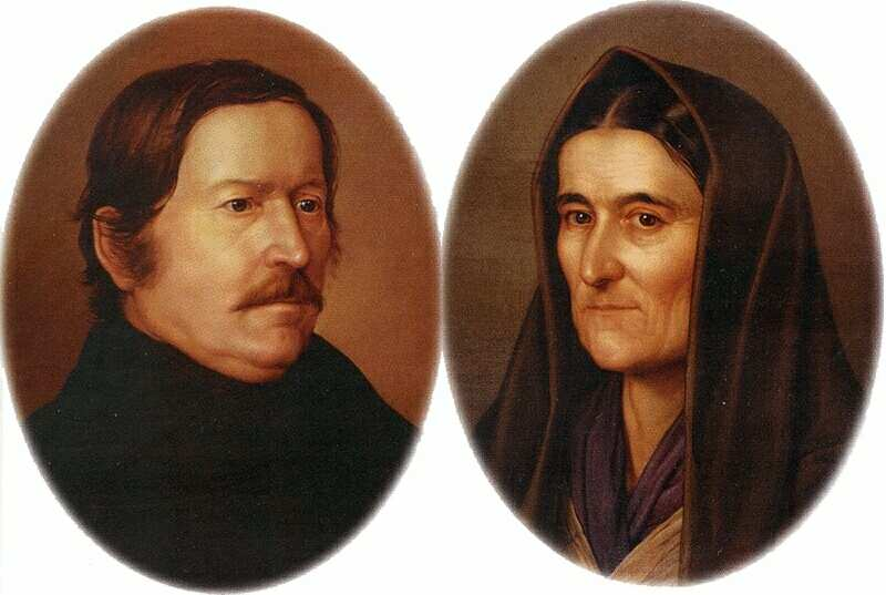 Orlay Petrich Soma: Petőfi Sándor szülei